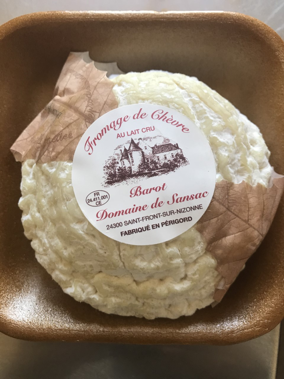 Fromage de chèvre barot du Périgord.